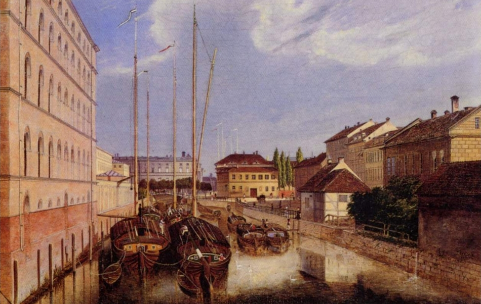 Ansicht des Berliner Kupfergrabens mit Speicher und Königlicher Büchsenmacherei.